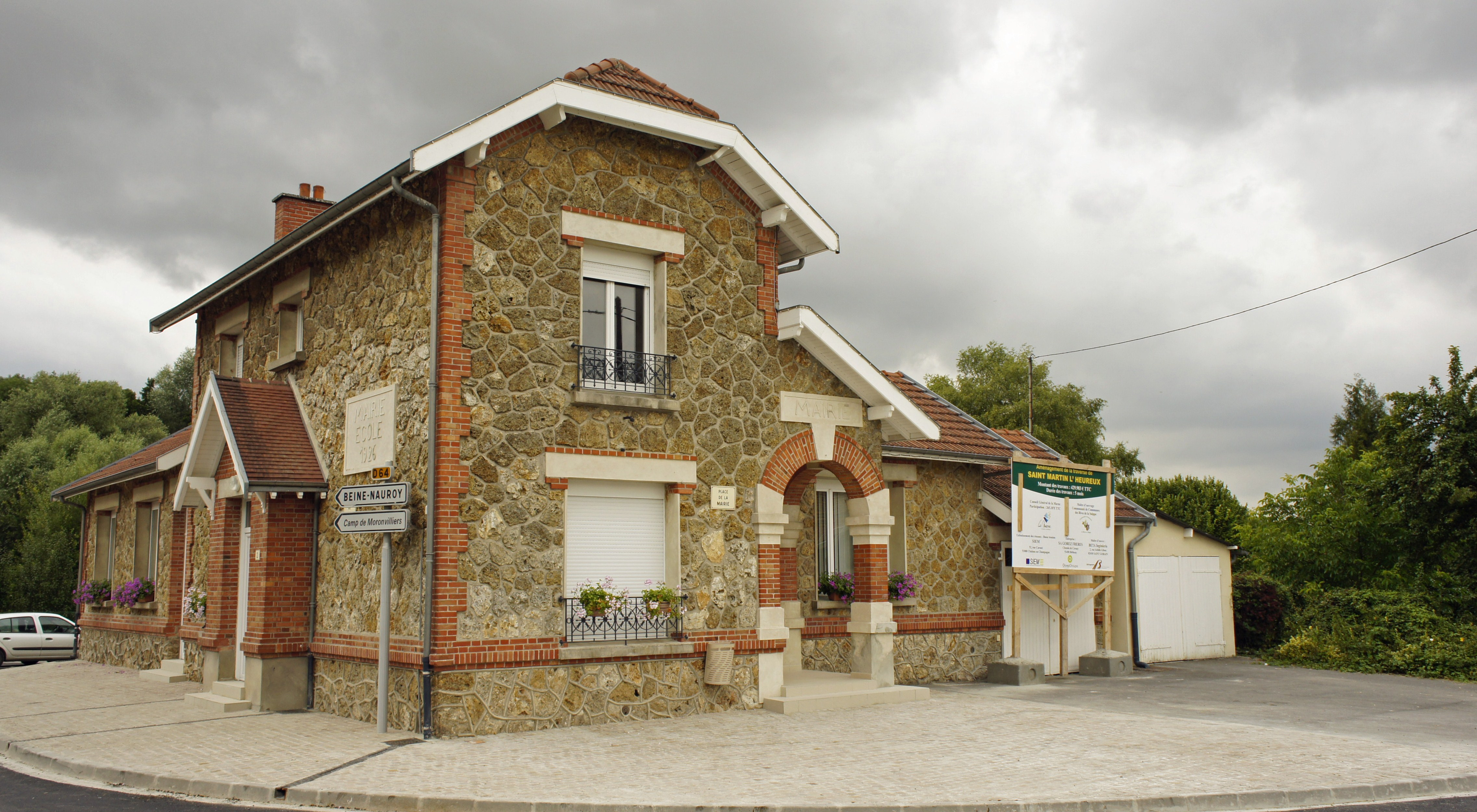 vue de la mairie à Saint-Martin-l'Heureux.